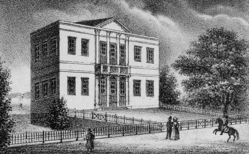 Weylandtska villan på Karta över Kungl. Djurgården